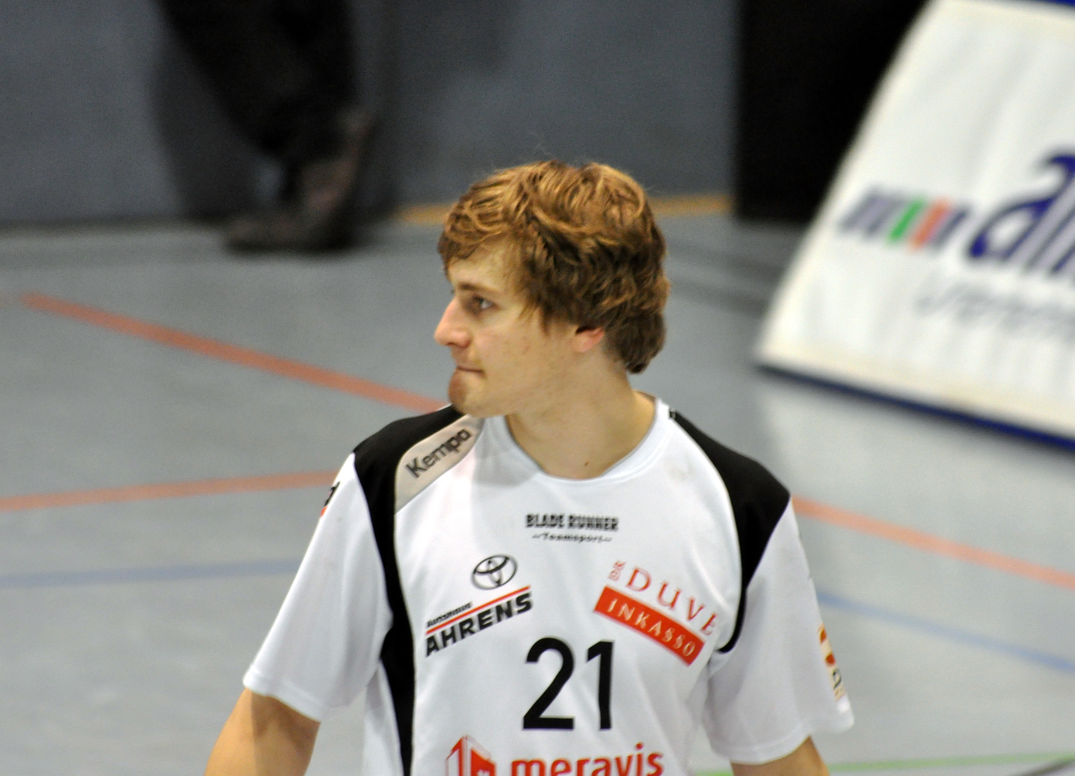 Beim Punktspiel in der 3. Liga Nord trafen der Stralsunder HV und der HSV Hannover am 19. März 2011 in der Stalsunder Vogelsanghalle gegeneinander an. Der Stralsunder HV gewann das Spiel mit 28:24 (16:9). Hubertus Brandes